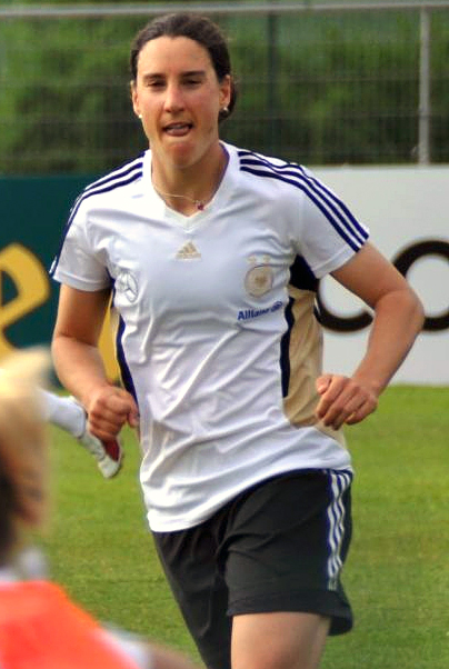 Birgit Prinz Cropped from File:Deutsche Frauen-Nationalmannschaft 5.jpg